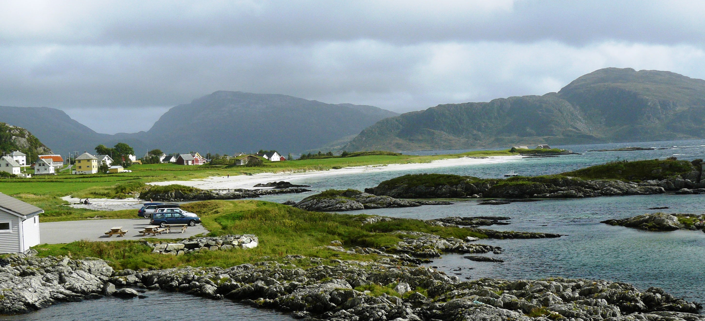 Grotle beach in Bremanger, Norway.jpg